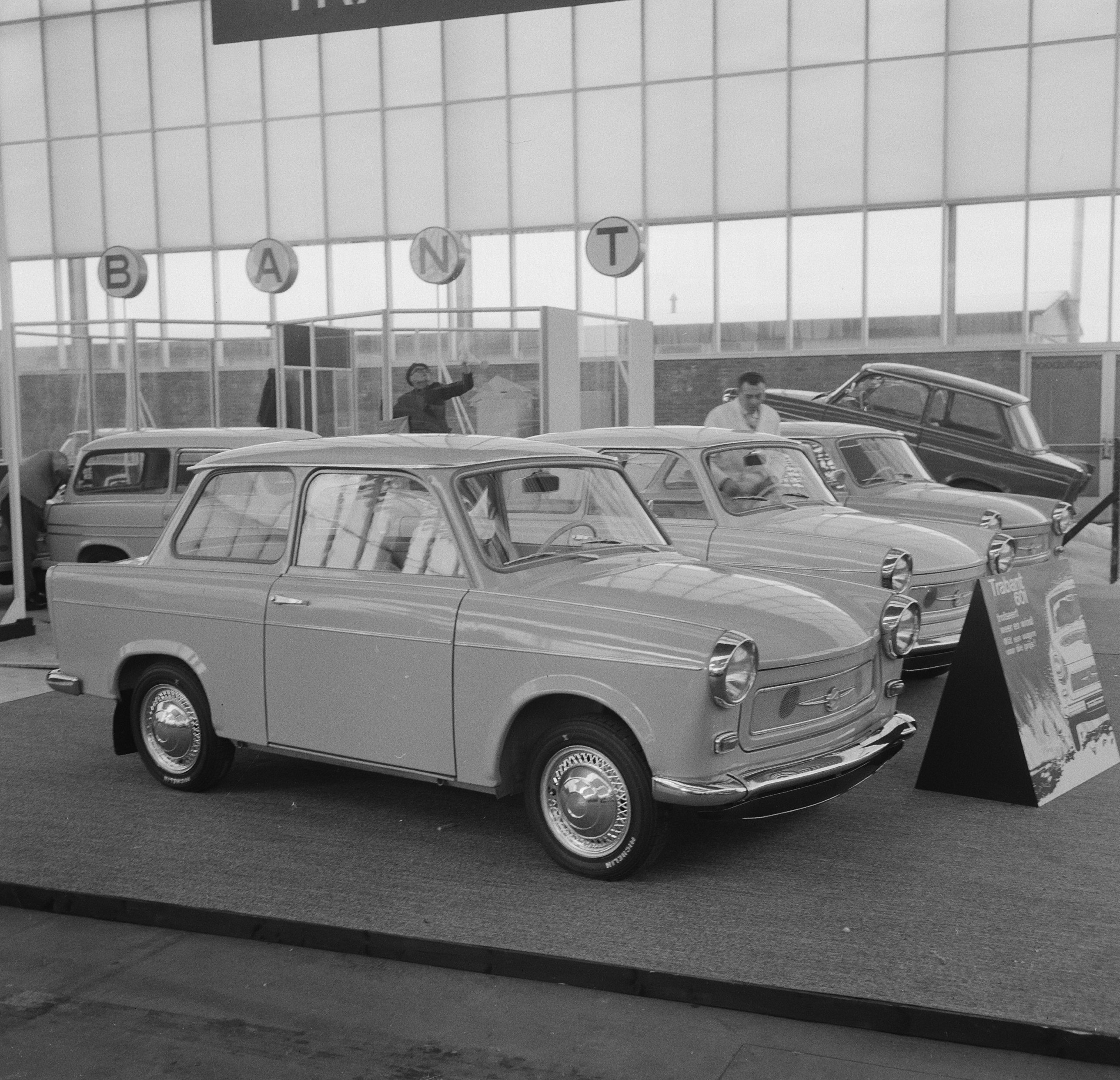 Collectie / Archief : Fotocollectie Anefo Reportage / Serie : [ onbekend ] Beschrijving : RAI autotentoonstelling, Trabant-stand Datum : 16 februari 1965 Trefwoorden : auto's, tentoonstellingen Instellingsnaam : RAI Fotograaf : Nijs, Jac. de / Anefo Auteursrechthebbende : Nationaal Archief Materiaalsoort : Negatief (zwart/wit) Nummer archiefinventaris : bekijk toegang 2.24.01.03 Bestanddeelnummer : 917-4381